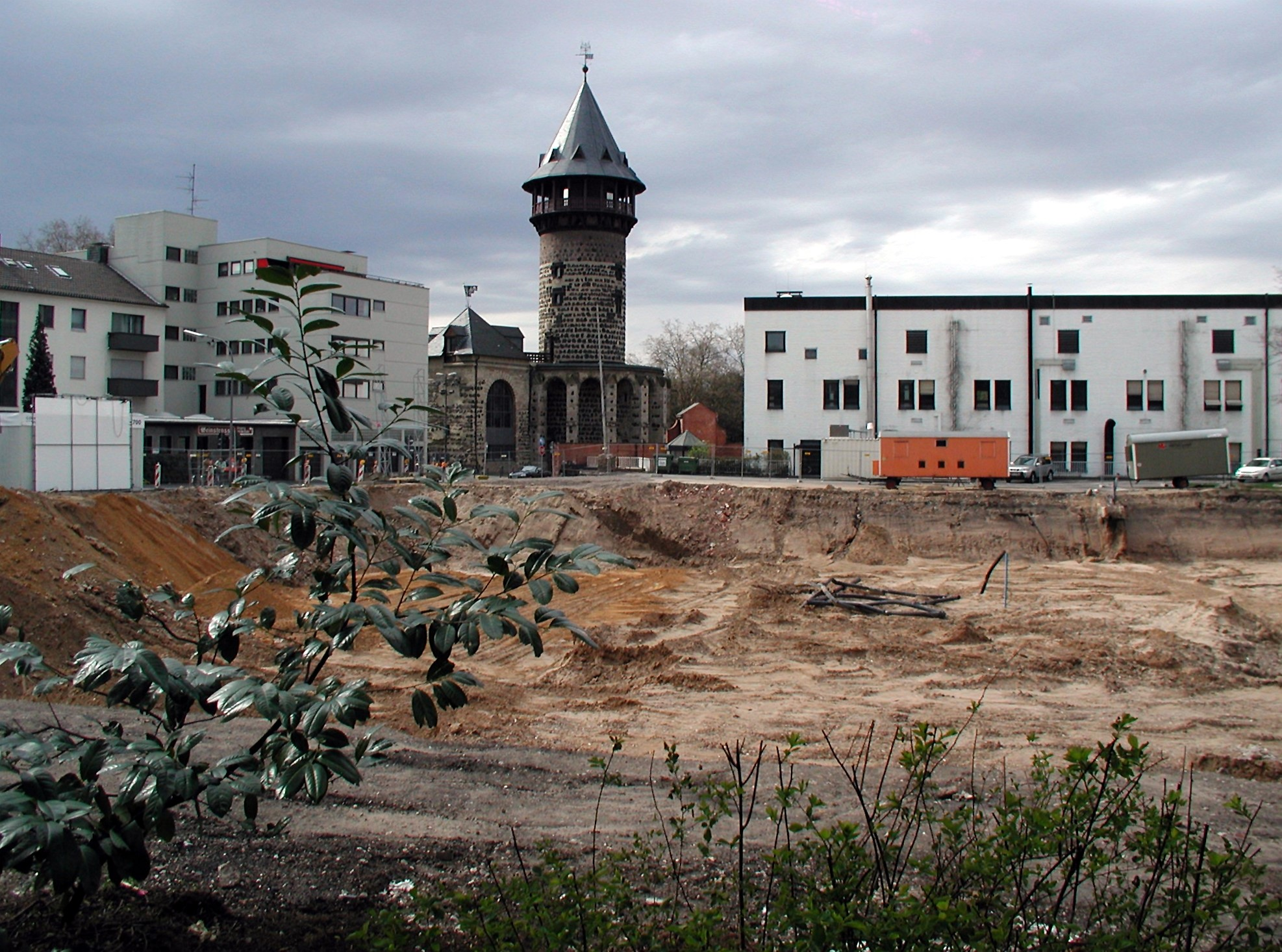 Archäologischer Nachweis mittelalterlichen Weinbaues in einem Weingarten der Kartäuser unterhalb der Ulrepforte. Grabungen im Frühjahr 2008